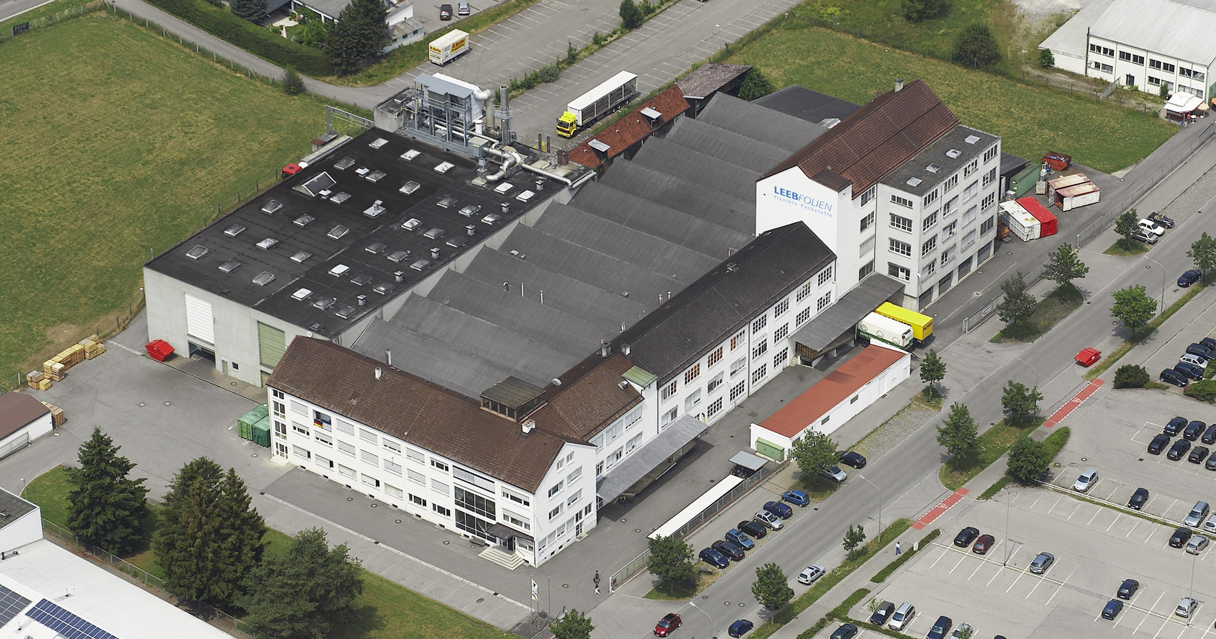 Luftbild der Firma Leeb Folien in Memmingen